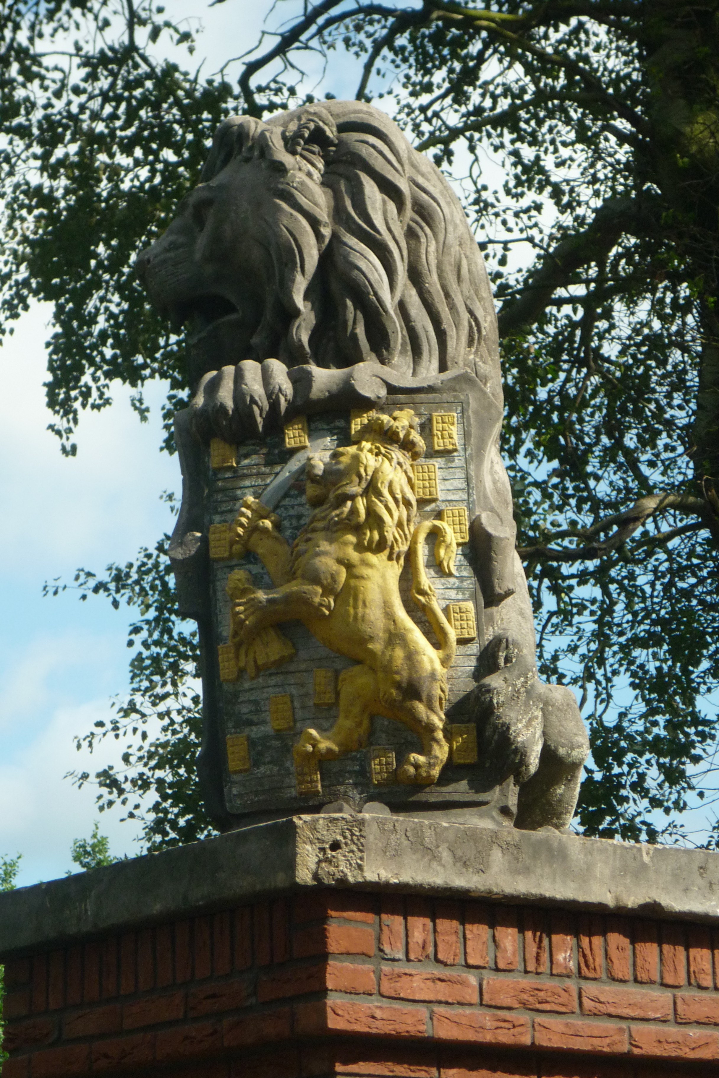 oude hek van de dierentuin in Wassenaar, nu hek van het Louwman Museum